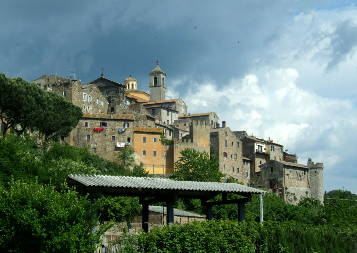 Vetralla, Italy